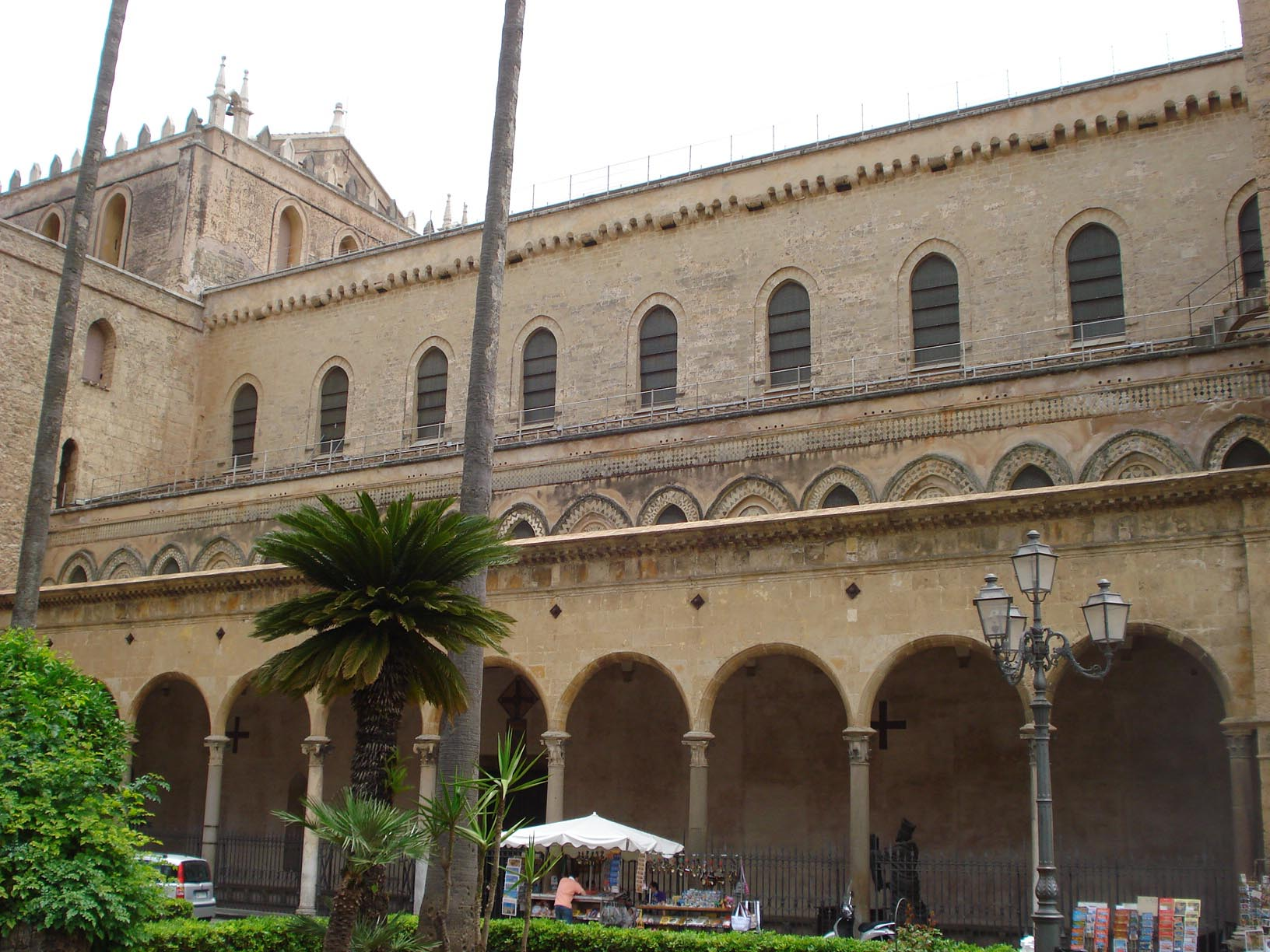 Cattedrale di Monreale